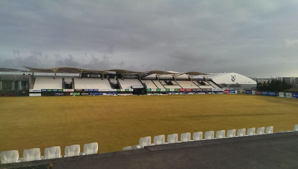 Stadion des FH Hafnarfjörður